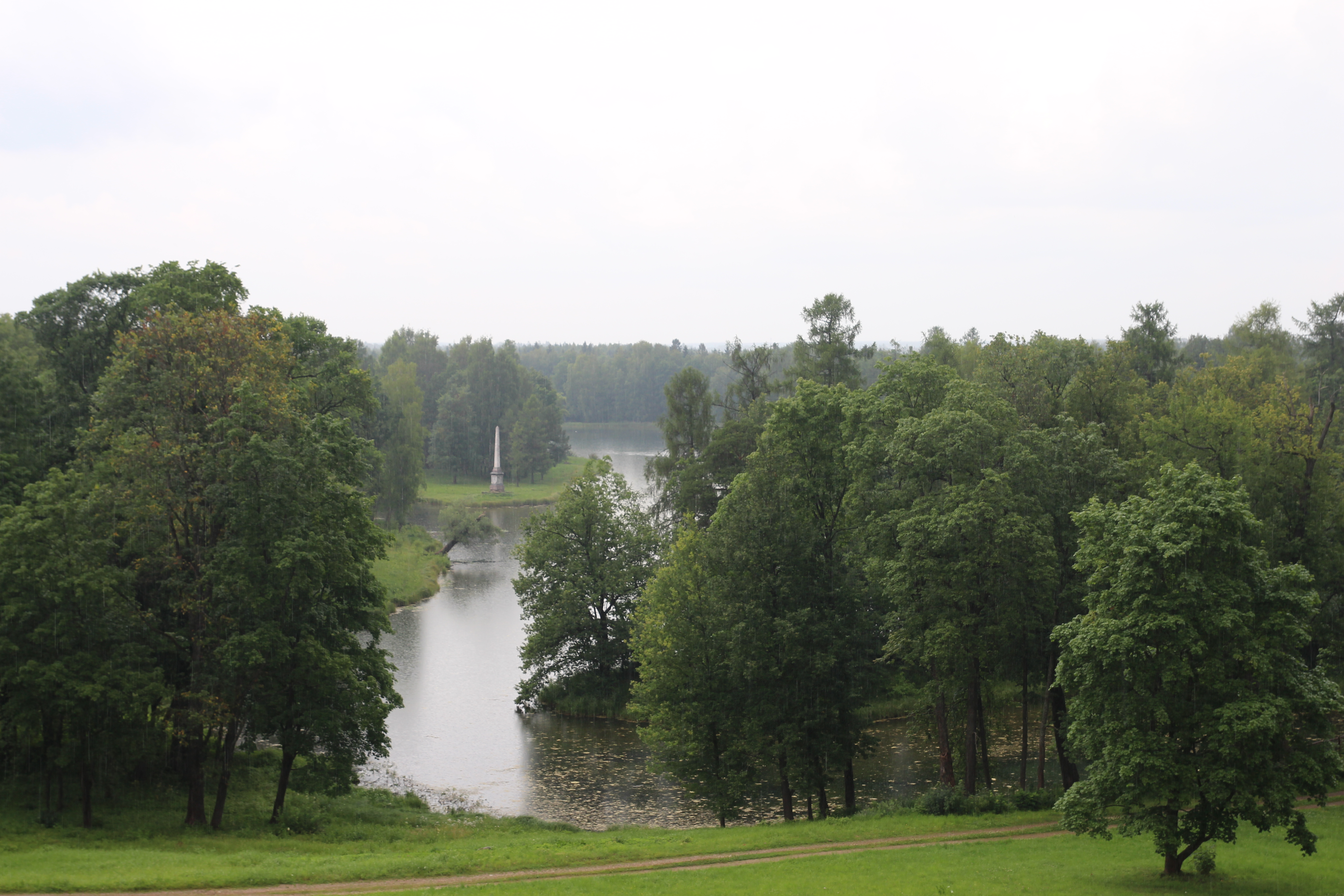 Парк (Санкт-Петербург и Лен.область, Гатчина, Дворцовый парк)